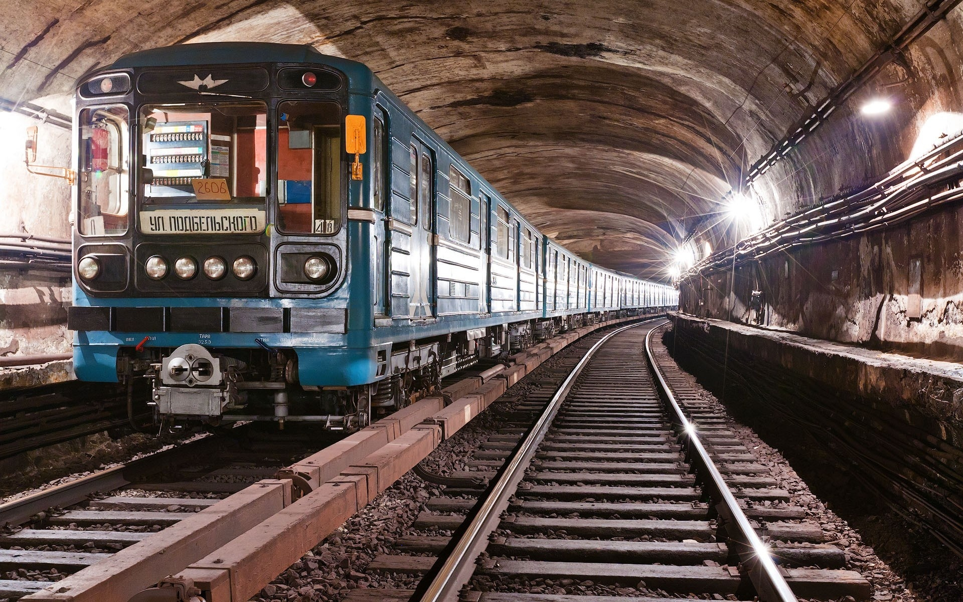 Электропоезд метрополитена 81-717.5M/714.5M с головным вагоном № 2606 в туннеле Сокольнической линии Московского метрополитена